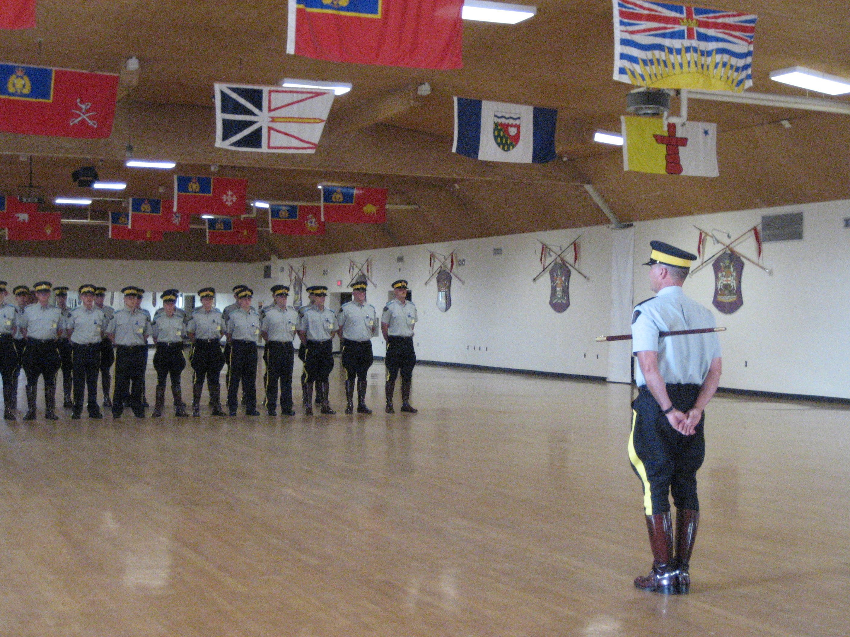 Peleton de recrues à l'école de la Gendarmerie Royale du Canada (Régina). Les recrues reçoivent un entrainement intensif de 6 mois, avant d'être aptes à servir comme policier partout au Canada. Prise par Declic 25 août 2006 à 23:46 (CEST)